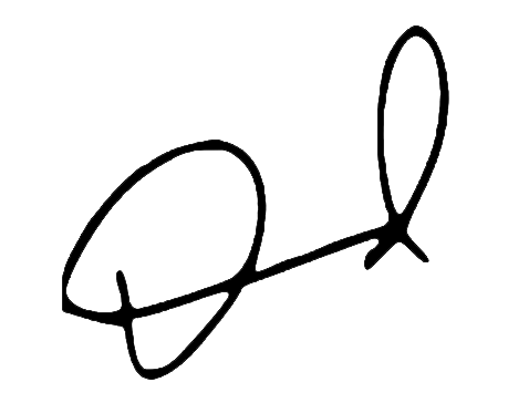 Autógrafo de David Miller, de Il Divo